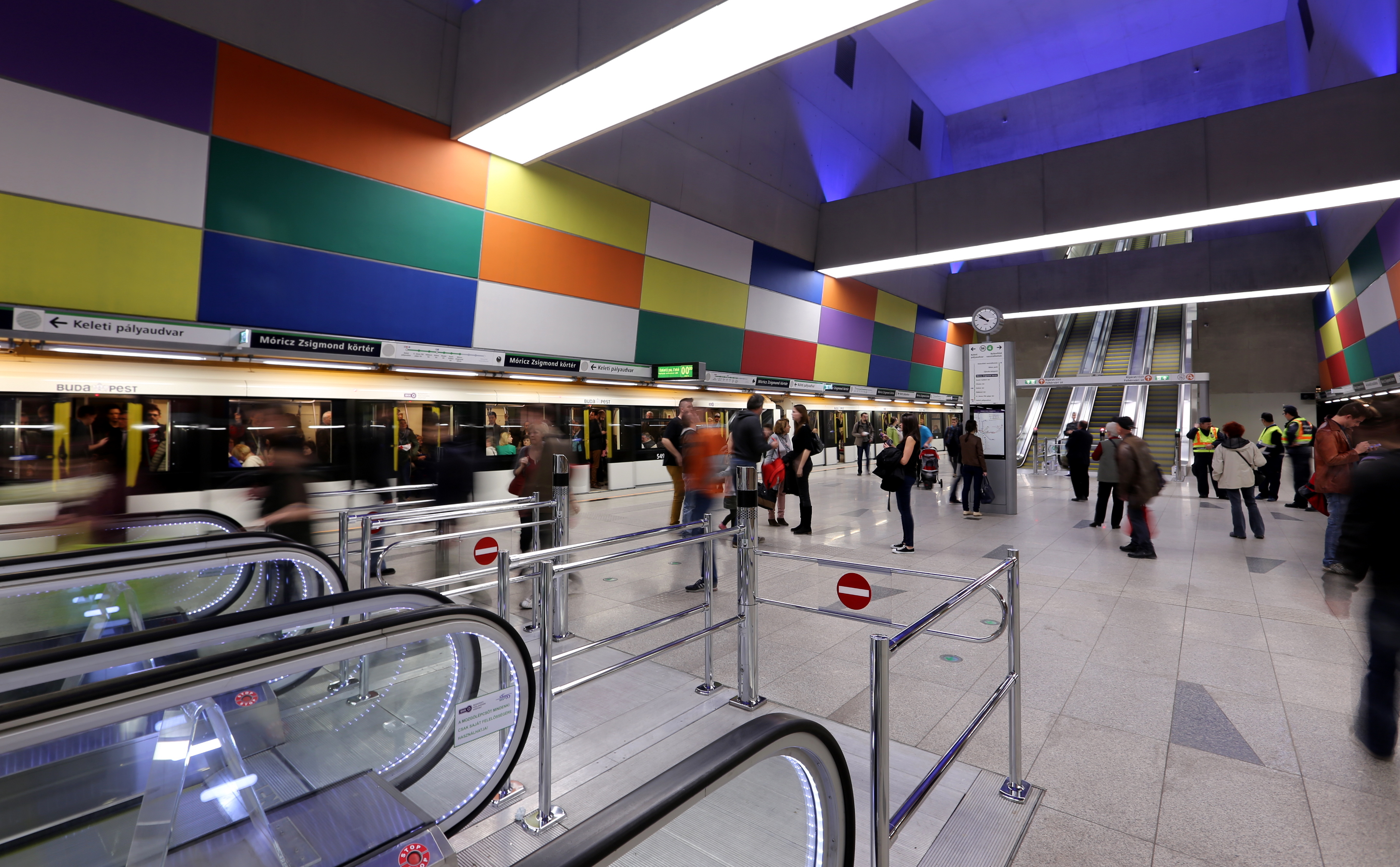 A 4. Metro Móricz Zsigmond téri állomása